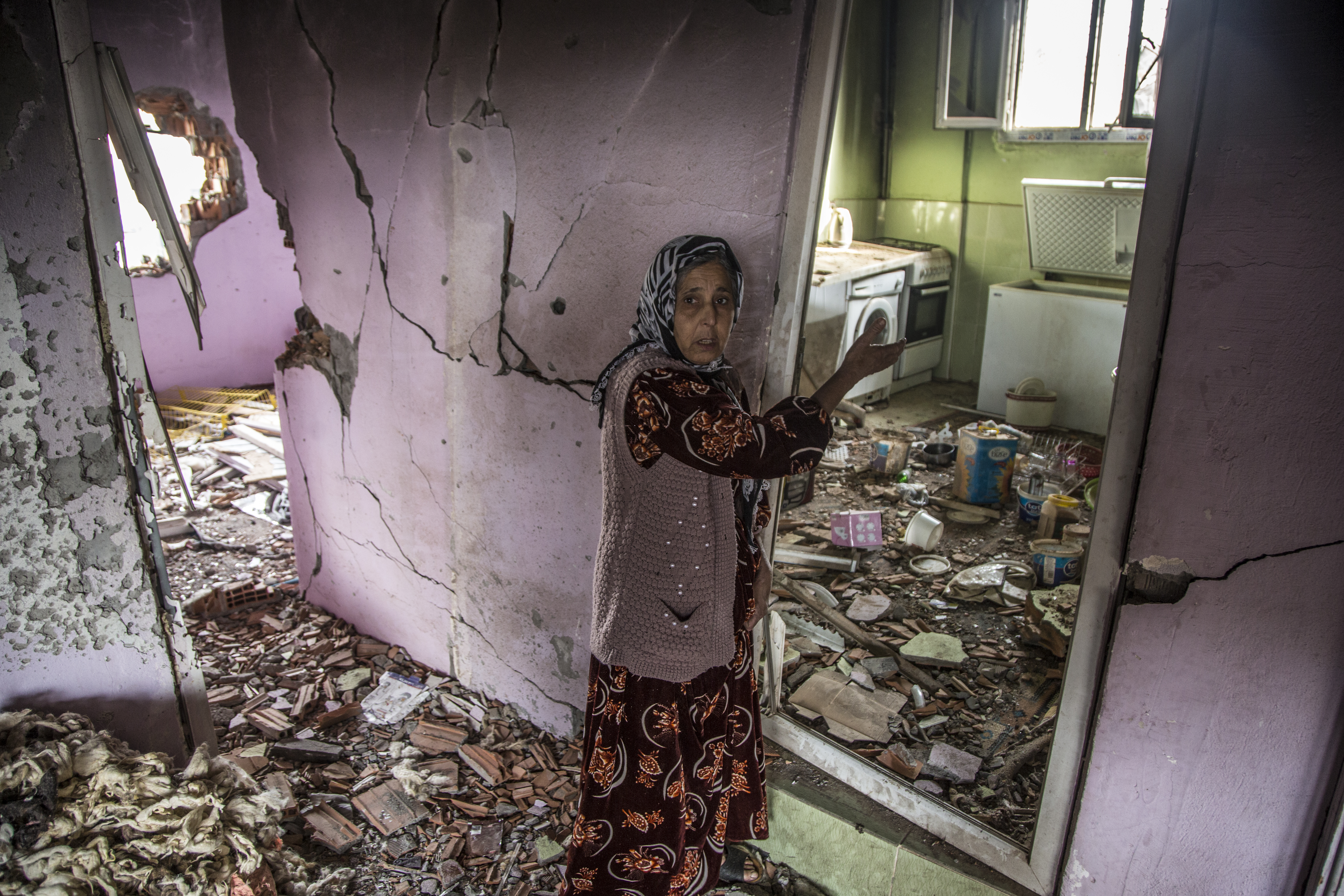 Silopi'deki çatışmalar sırasında hasar gören bir evin içi, 22 Ocak 2016